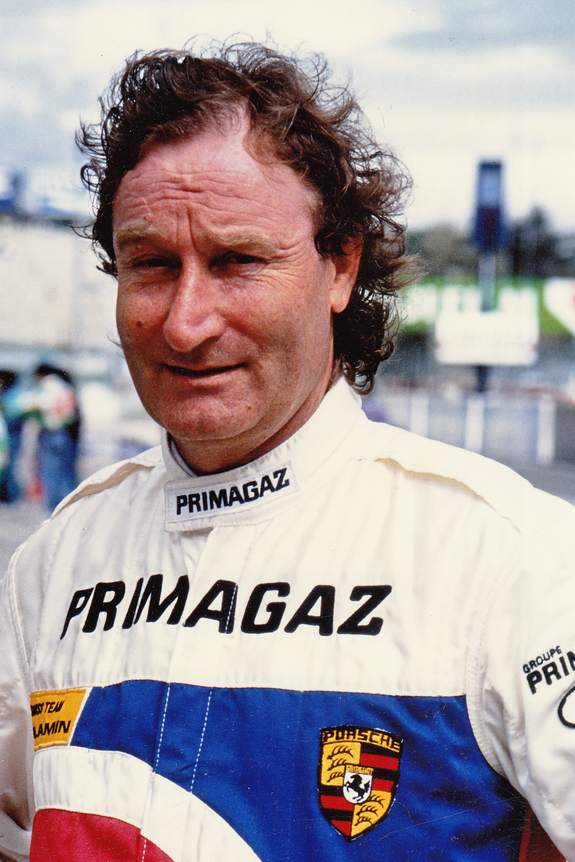 Antoine Salamin à Suzuka en 1991